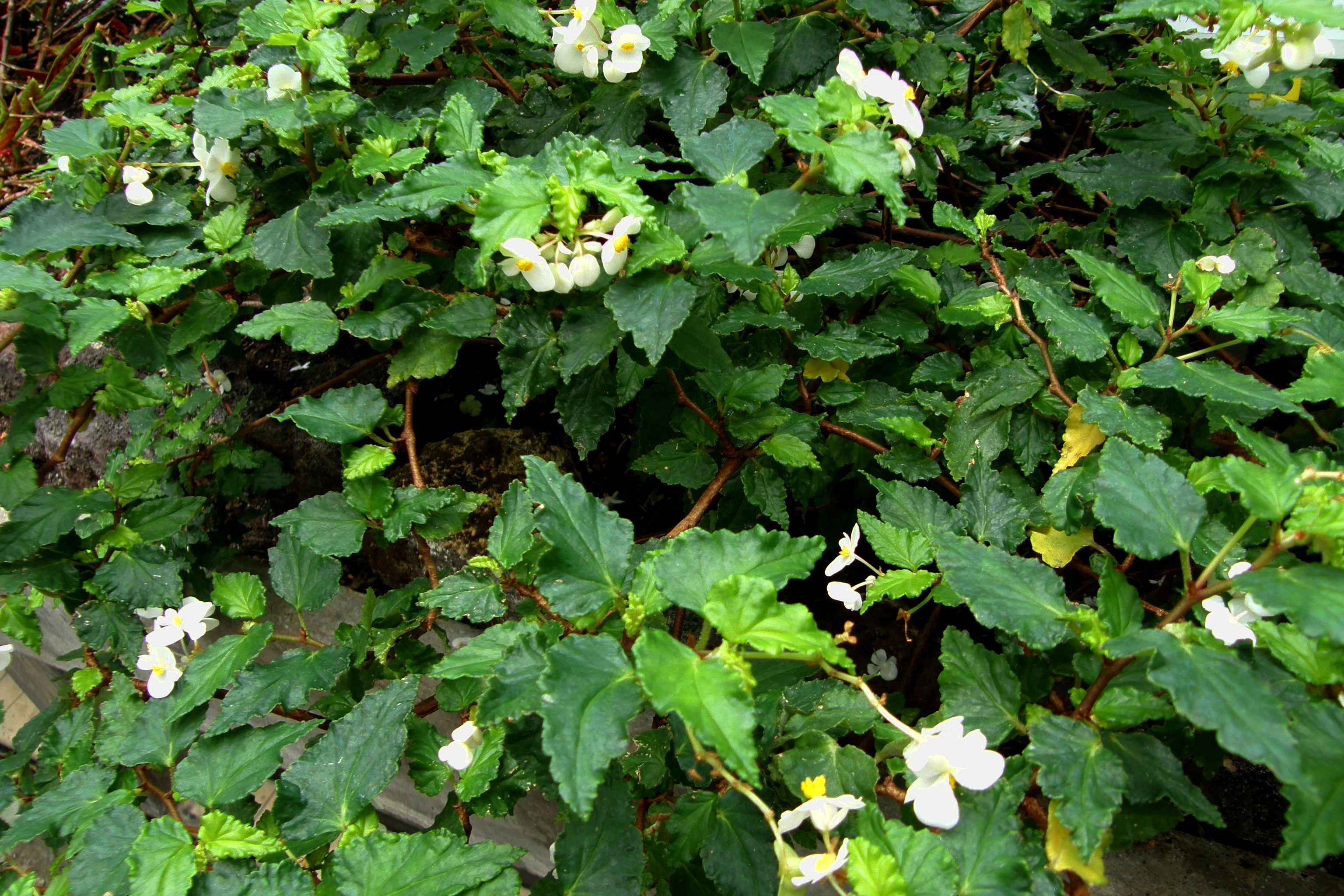 Begonia cubensis Hassk. dans la serre du Botanischer Garten de Berlin-Dahlem